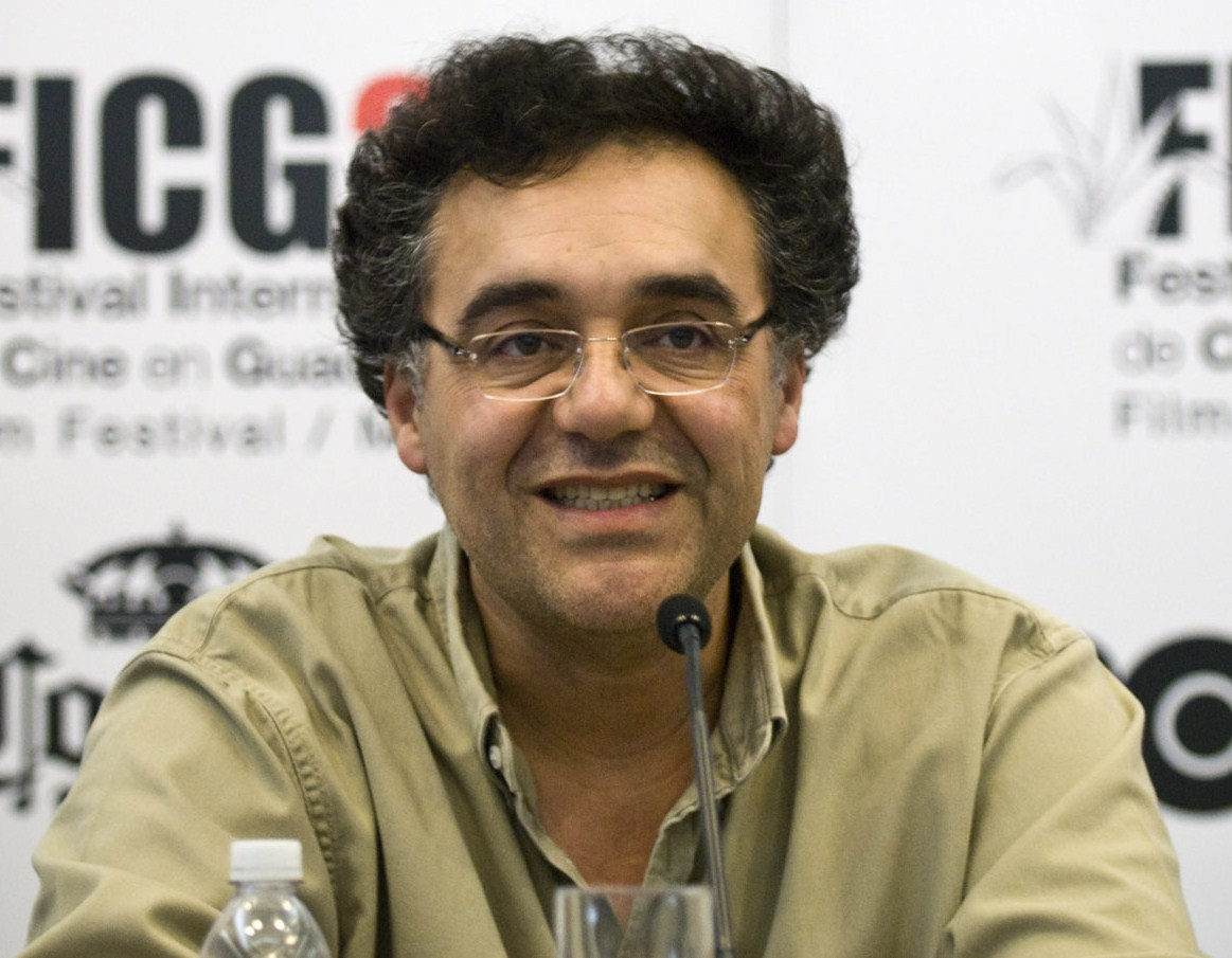 Conferencia de prensa de Rodrigo García (centro), acompañado por la actriz Elpidia Carrillo (derecha) y Enrique Blanc (izquierda) como presentador, dentro de las actividades del Festival Internacional de Cine de Guadalajara en su edición 25. 17 de Marzo, 2010. Guadalajara, México. © Cortesía FICG25 / Michel Amado Carpio.